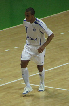 Сирило в матче против ВИЗ-Синары. Екатеринбург, 2010